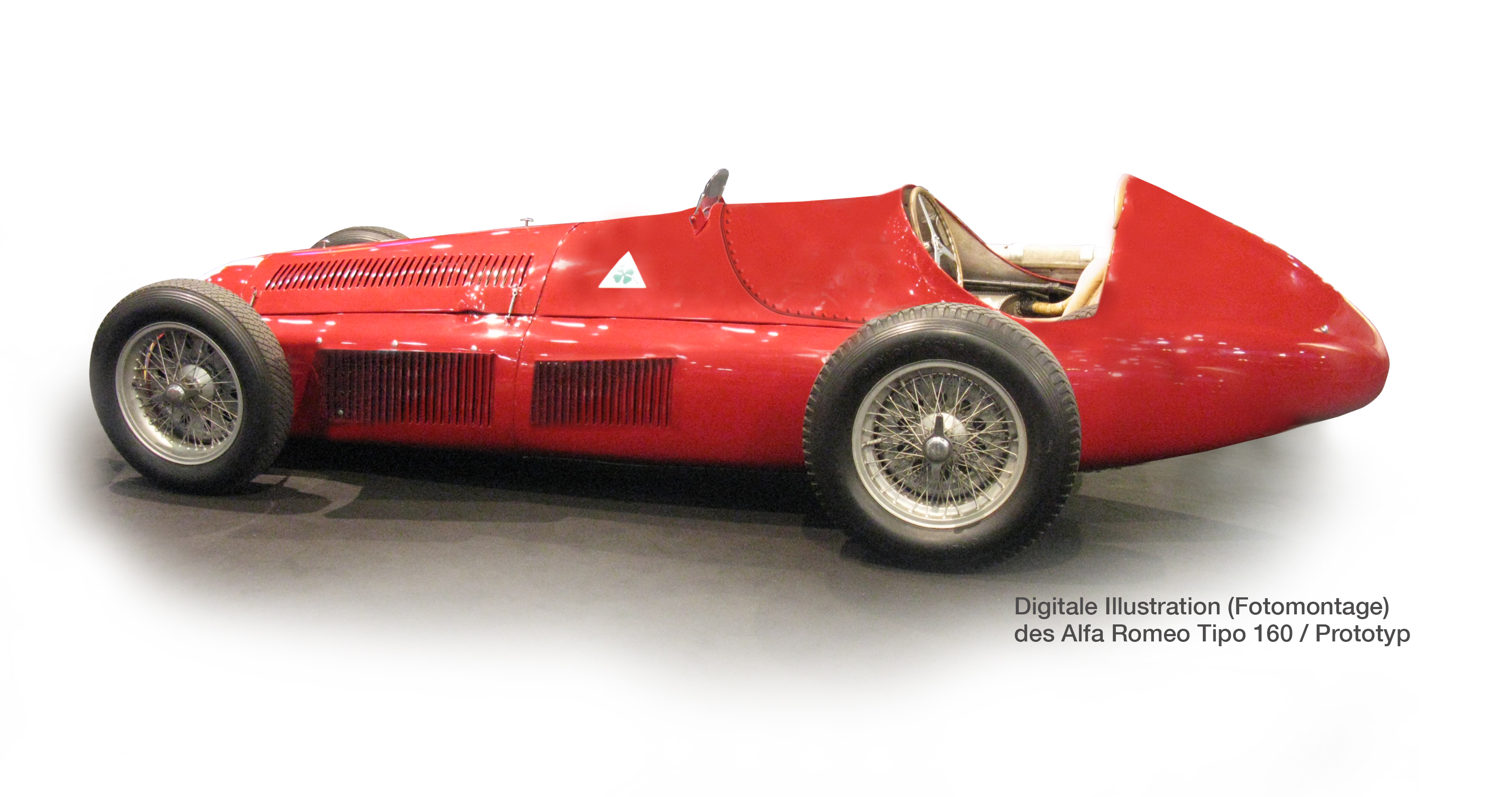 Digitale Fotomontage zur Linienführung des Prototypen für den AR Tipo 160, basierend auf einem Foto des zugrunde liegenden Modells 159